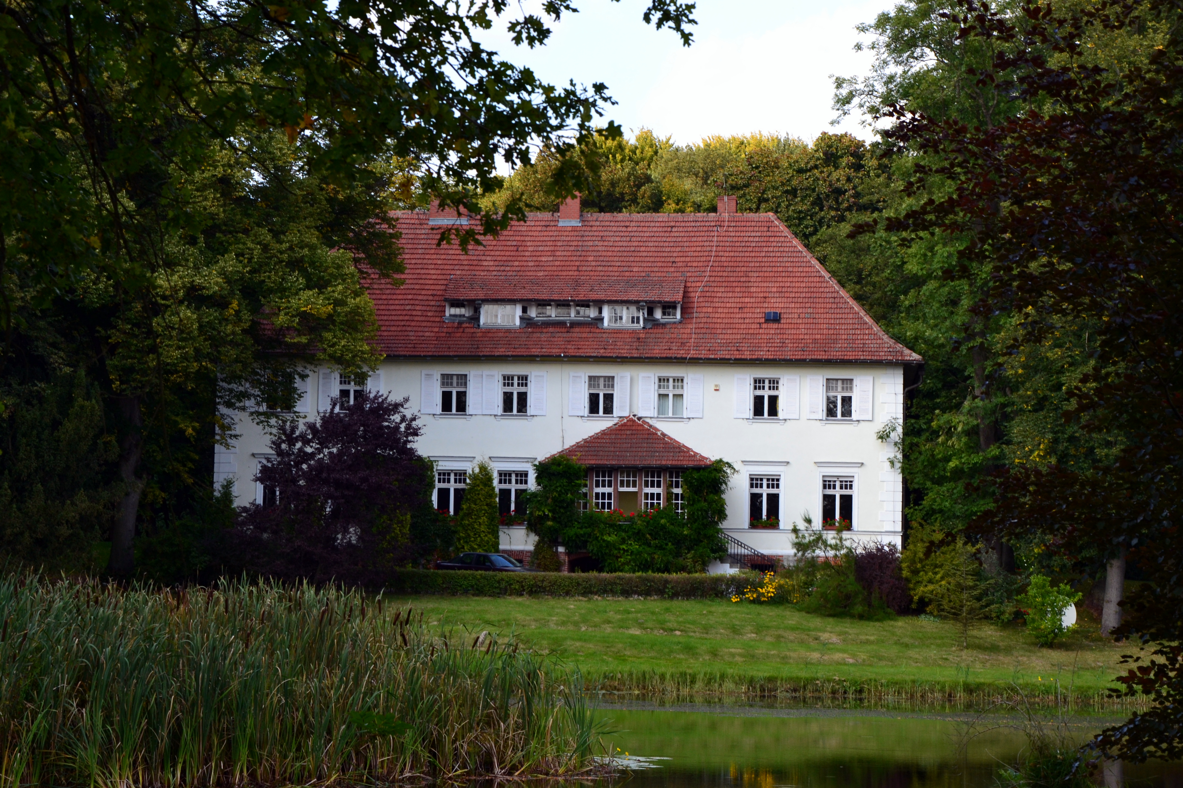 dwór Chełm Górny, Trzcińsko Zdrój